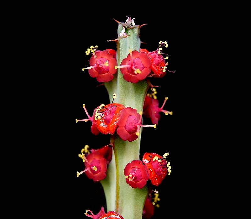 Euphorbia fluminis